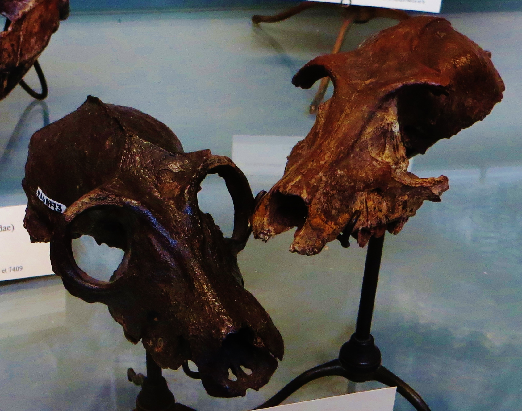 Fossil of Pachylemur, an extinct mammal- Took the photo at Musee d'Histoire Naturelle, Paris